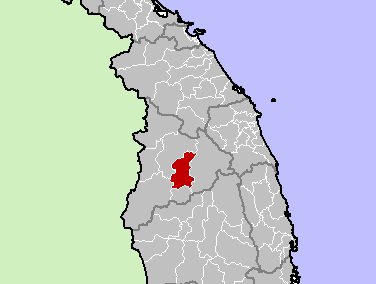 Dak Ha District, Kon Tum Province, Vietnam.